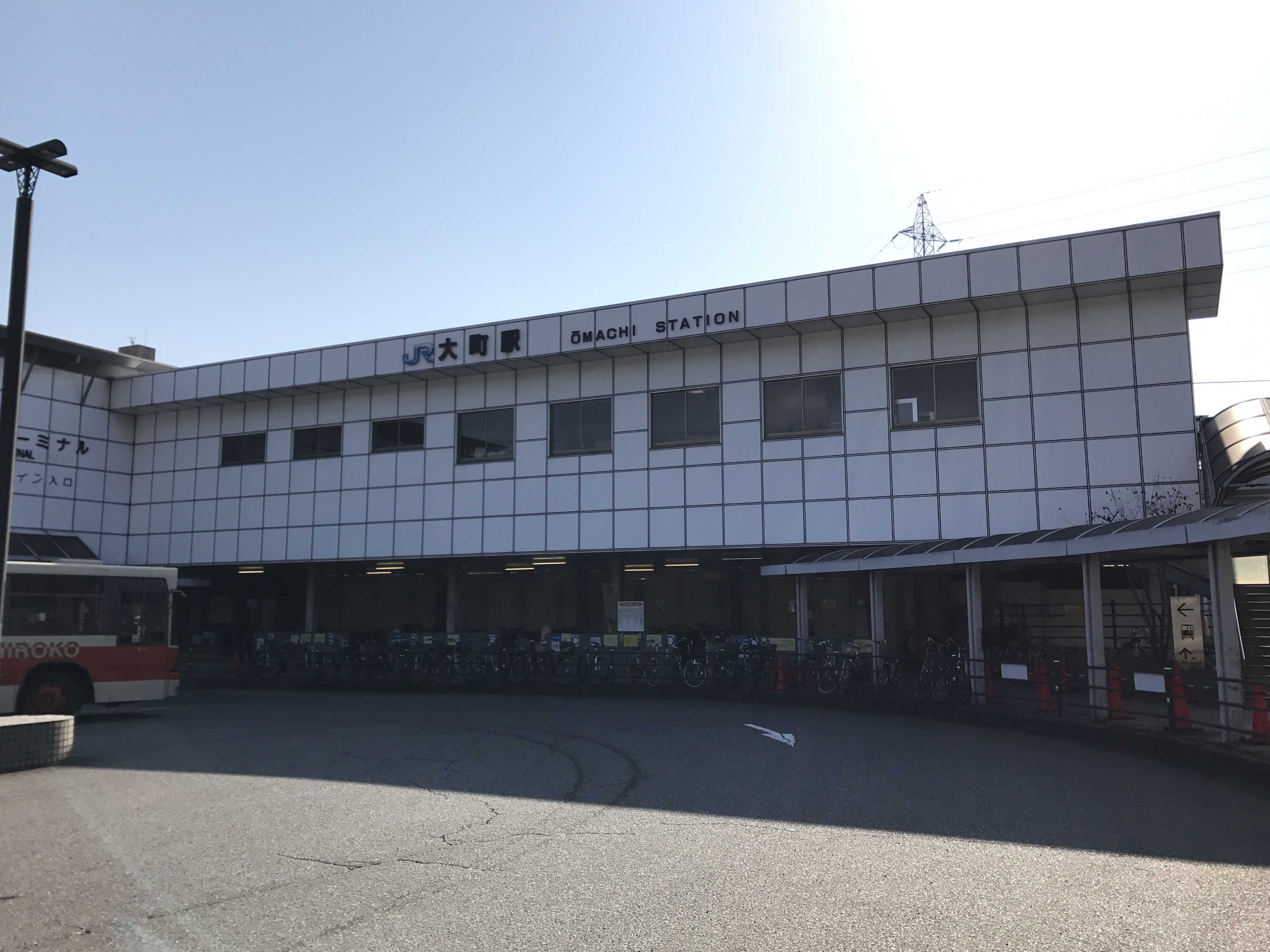 大町駅(可部線)の駅舎